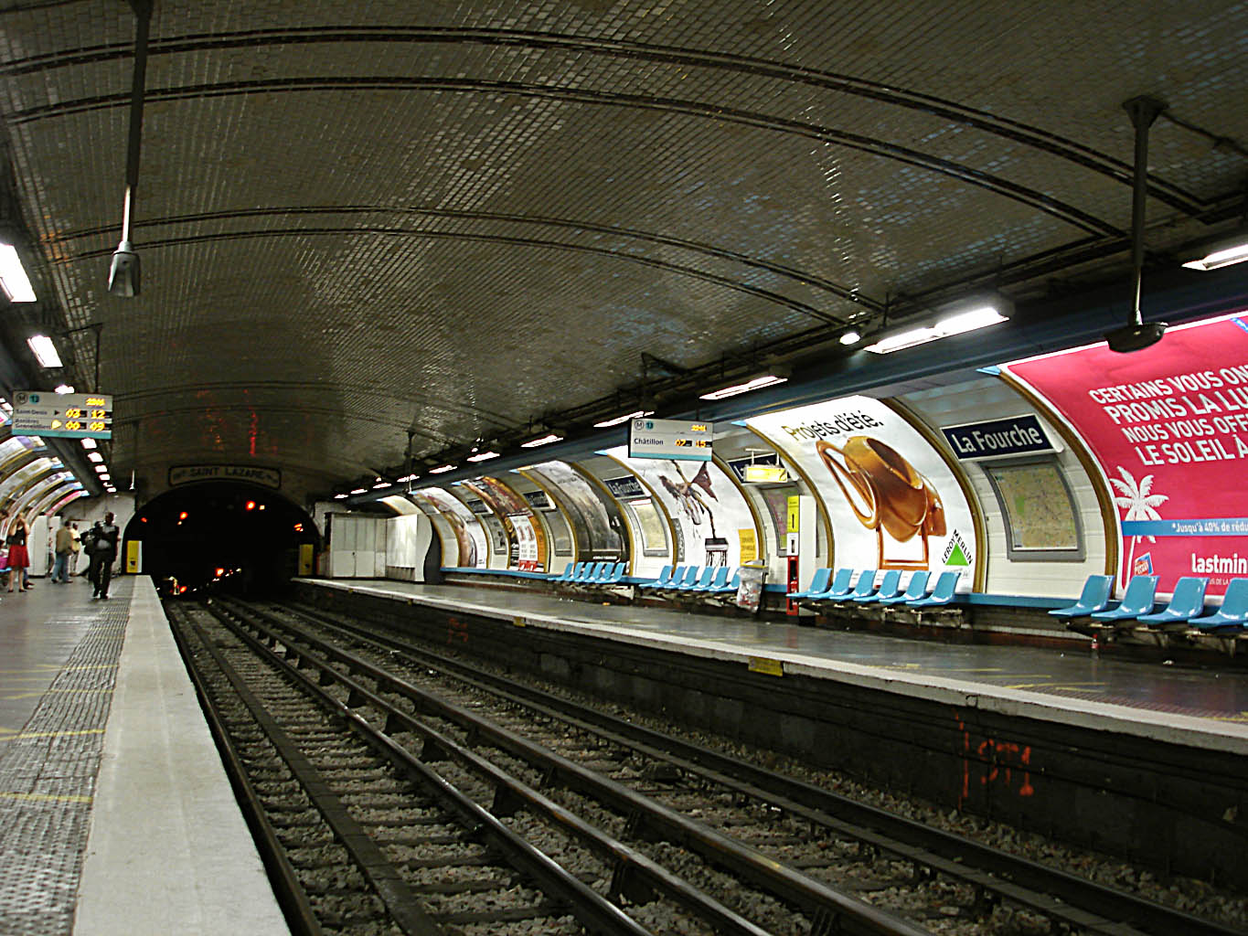 Station La Fourche, de la ligne 13 du métro de Paris, France.